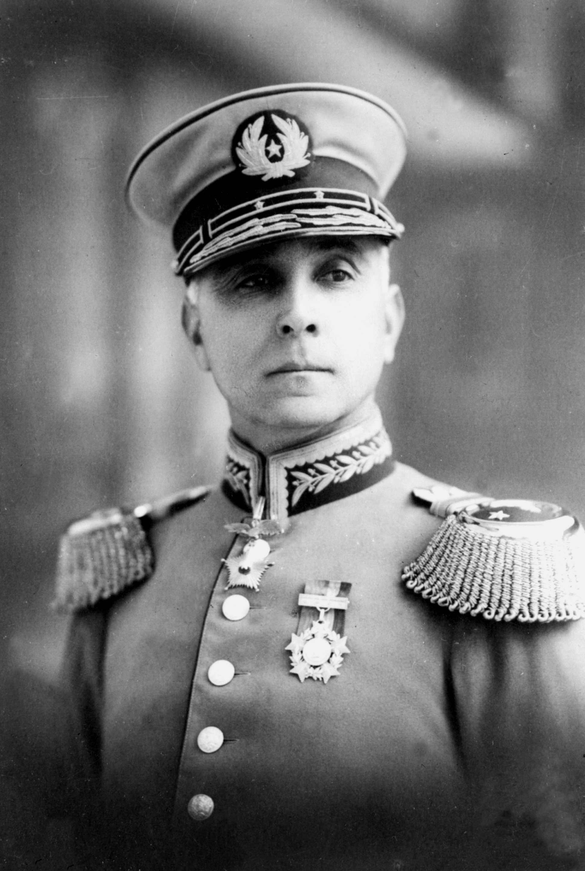 General Bartolomé Blanche, Presidente Provisional de la República Socialista (1932)